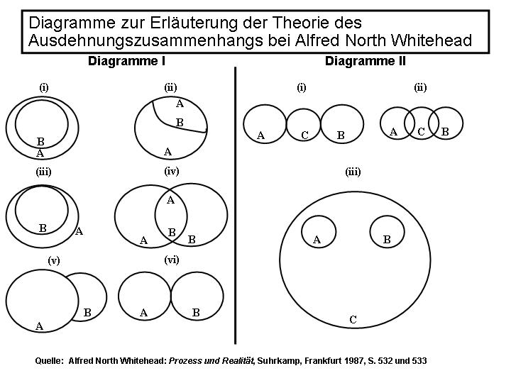 Diagramme zur Erläuterung der Theorie des Ausdehnungszusammenhangs bei Alfred North Whitehead